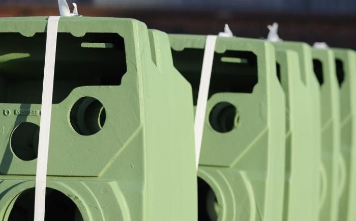 Getriebegehäuse, Grauguss, gearbox, greyiron